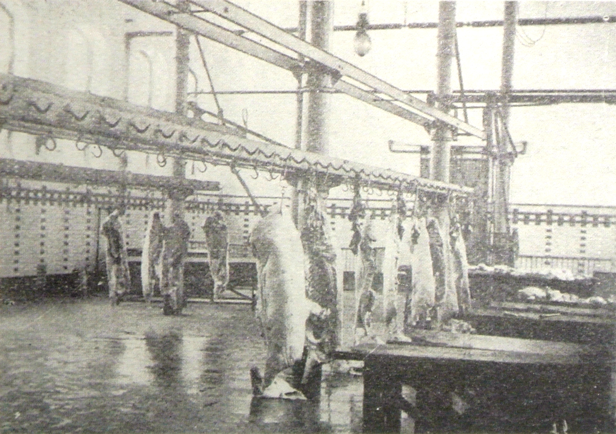 青岛总督府屠宰场内景